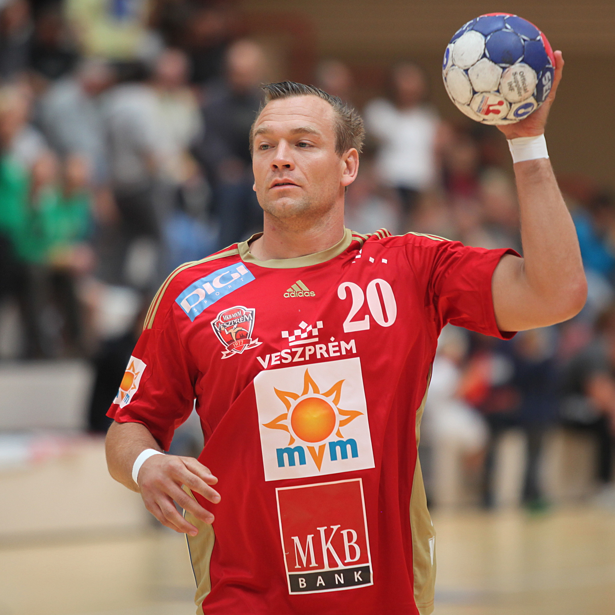 Christian Zeitz, Handballspieler bei KC Veszprém am 16. August 2014 beim Sparkassen-Cup in Ehingen.